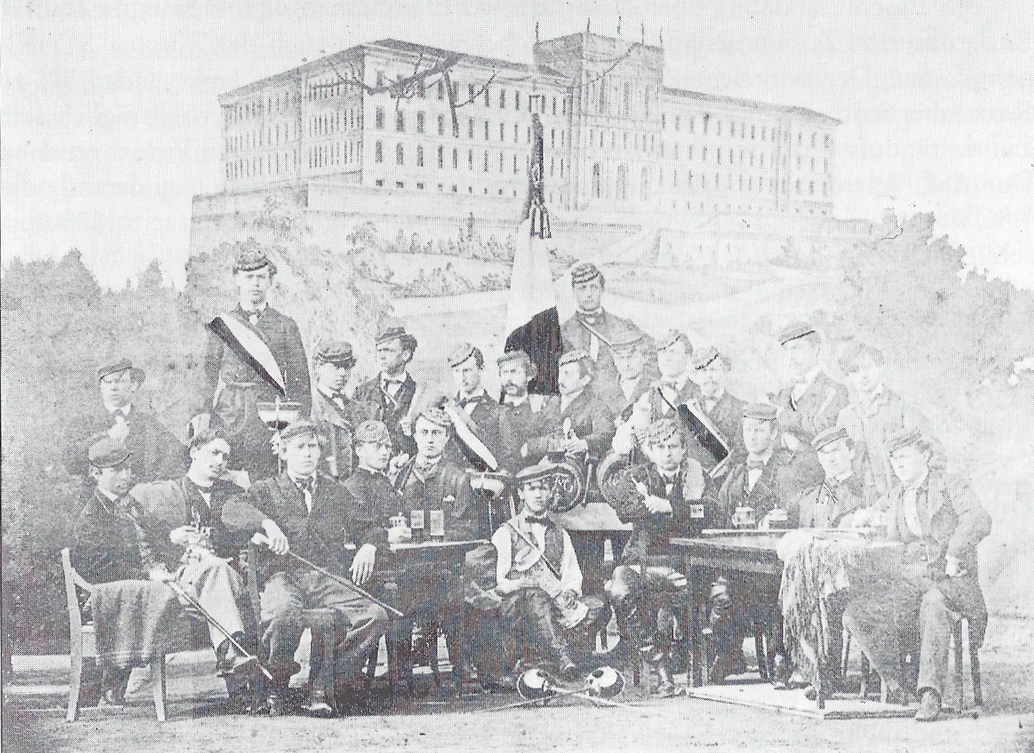 Semesterbild des Corps Helvetia Zürich (WSC) Wintersemester 1864/65